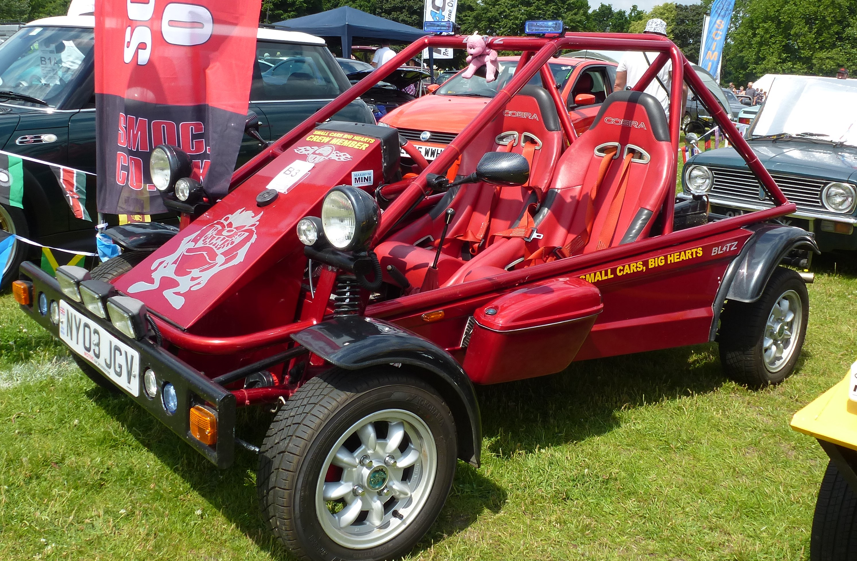 NCF Blitz 2003